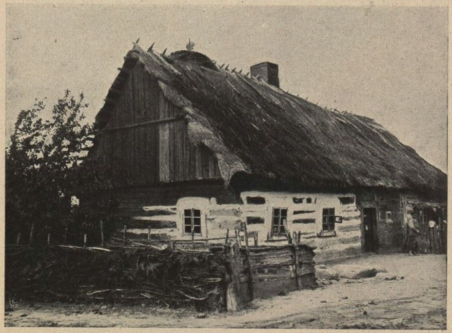 Okolice, chata. Materiały z wystawy Architektury Polskiej, urządzonej w 1915 r. staraniem Koła Architektów i Towarzystwa Opieki nad Zabytkami Przeszłości w Warszawie.